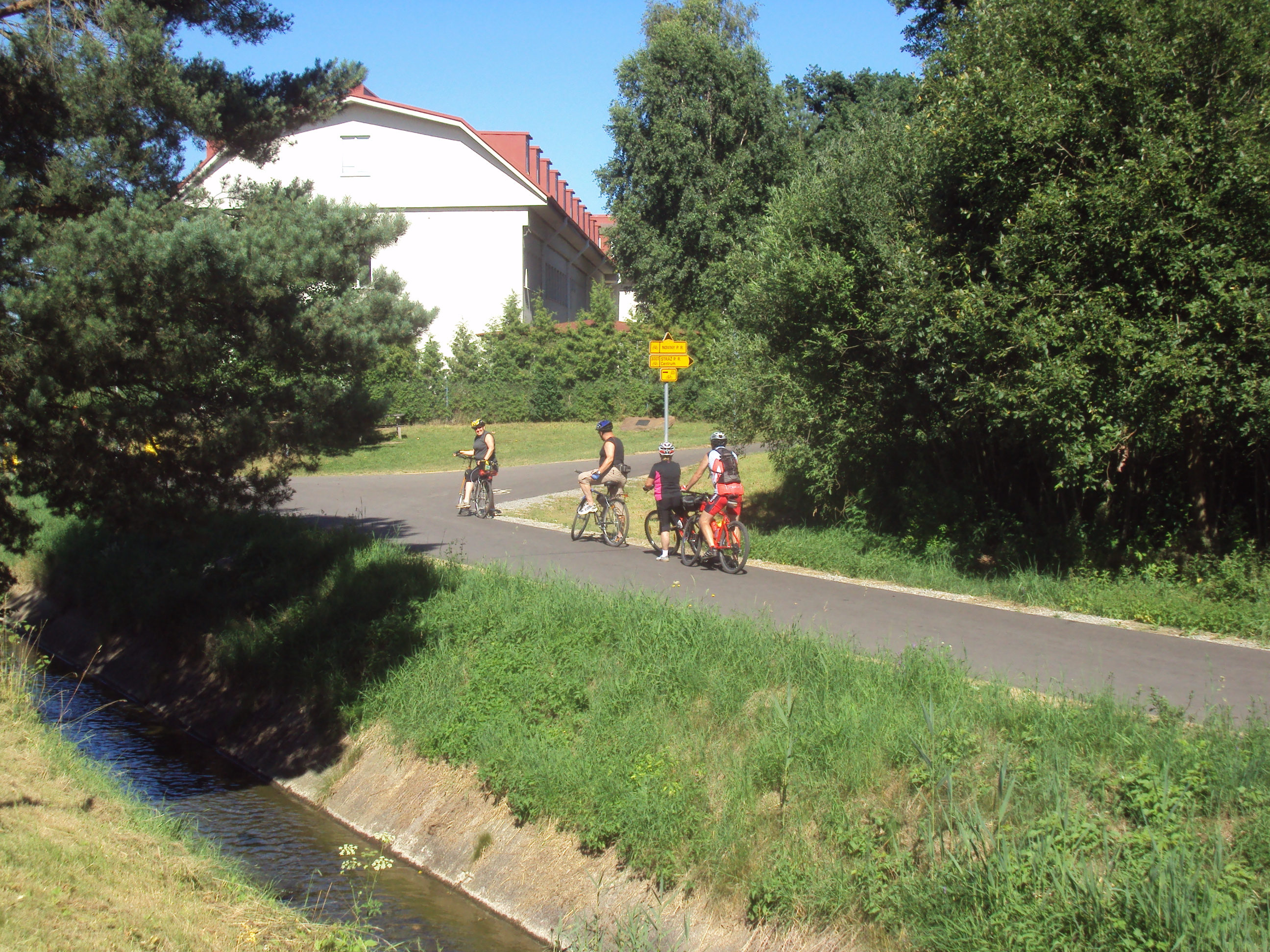 Cyklomagistrála Ploučnice na začátku Stráže